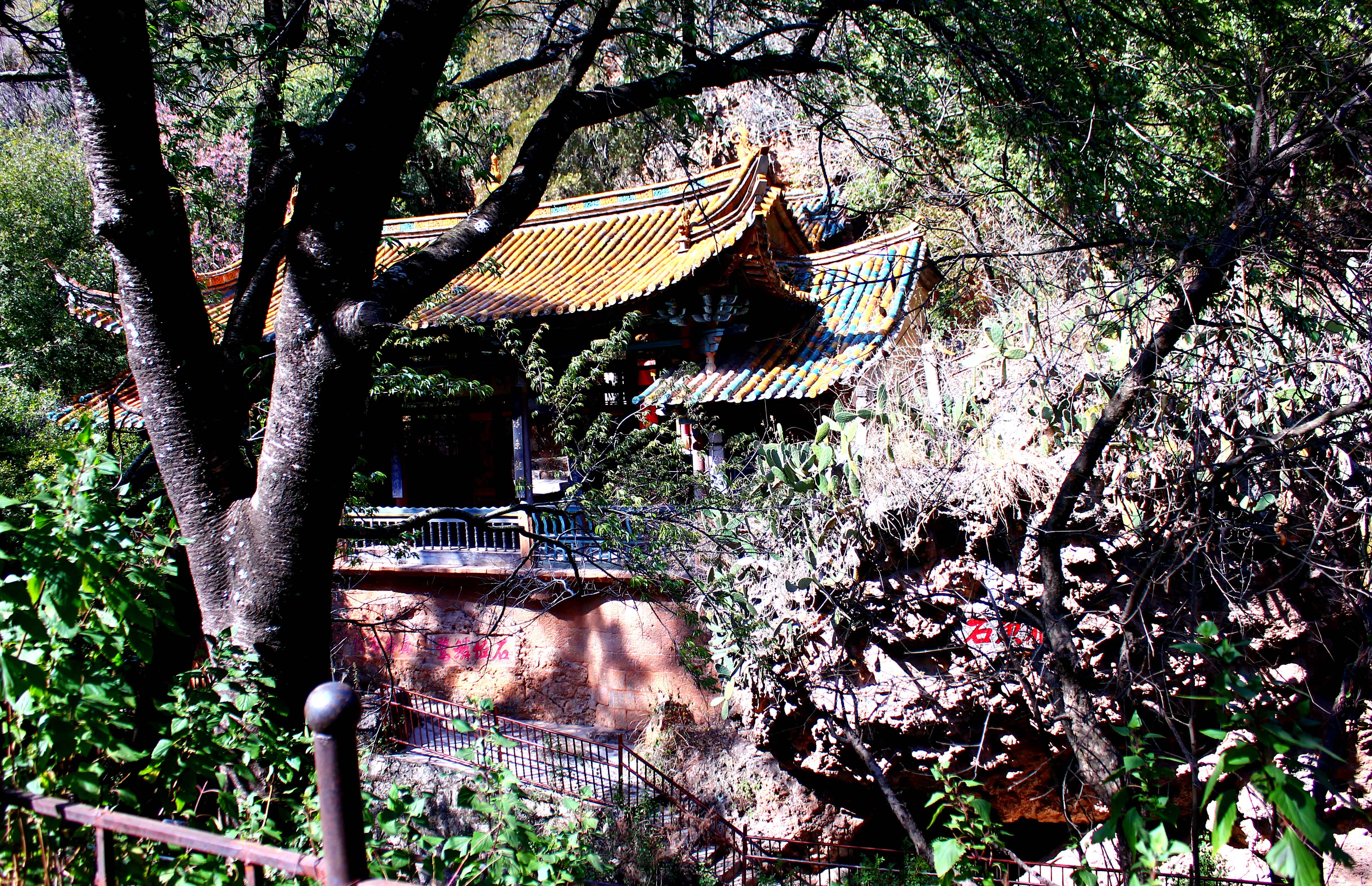 云南江川的鱼界石和观音寺，寺下石刻为“石怪鳞惊”和“鱼各有性”。